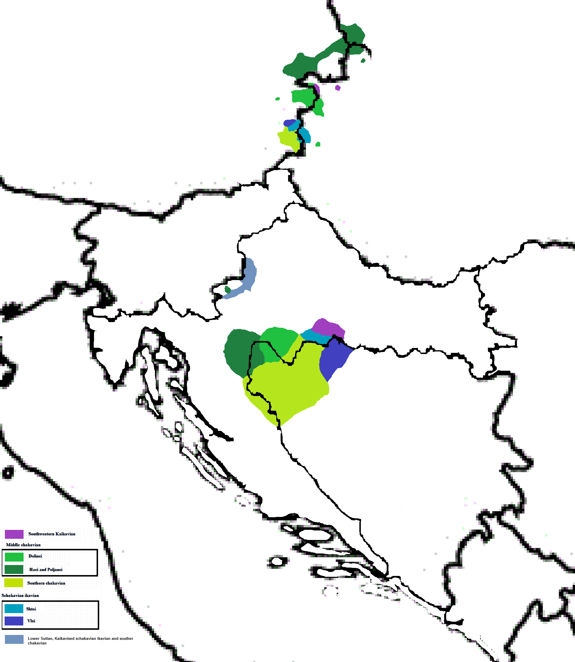 Migracija iz Pounja u Gradišće i na Donju Sutlu